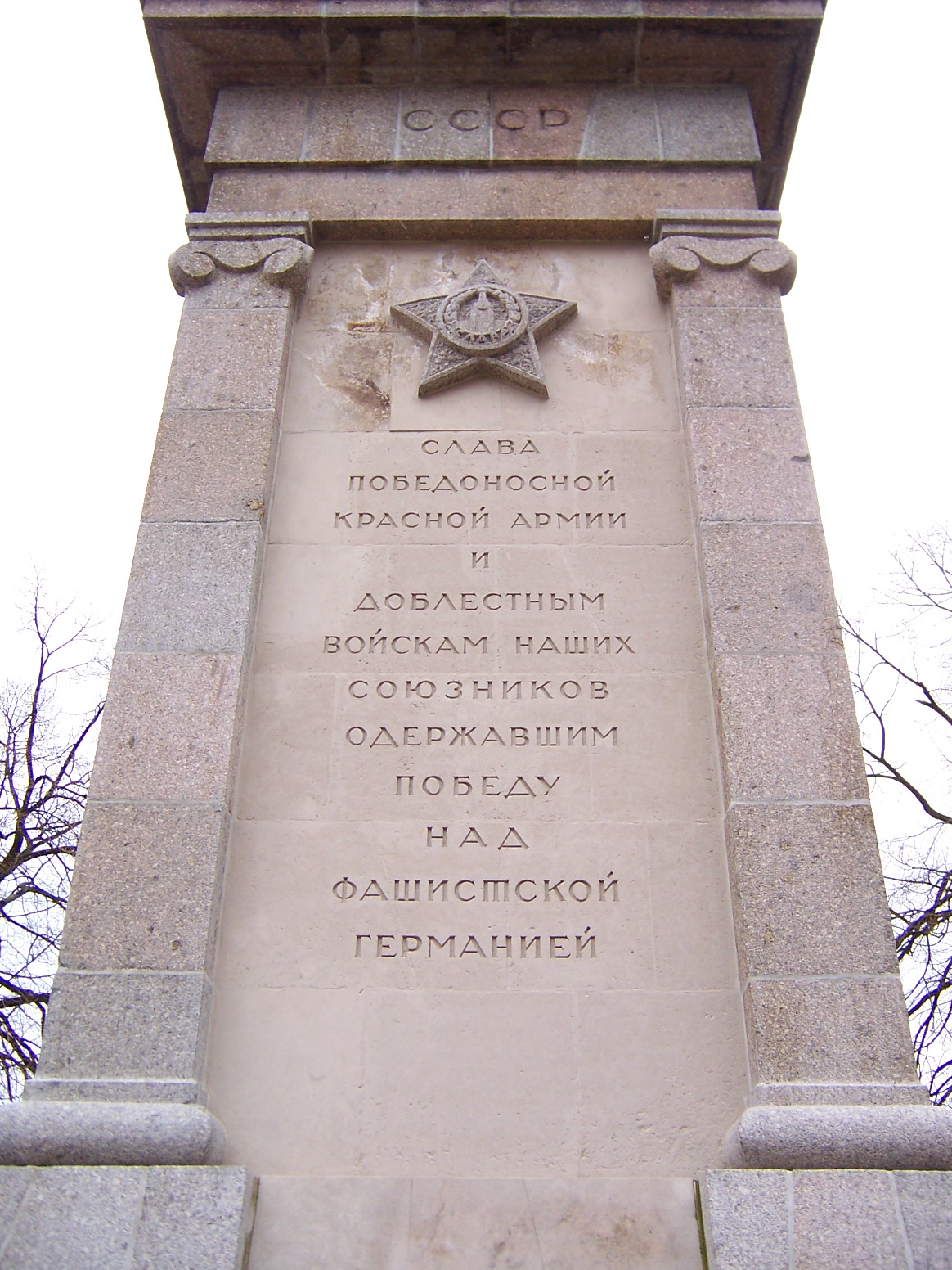 Denkmal der Begegnung zwischen amerikanischen und sowjetischen Truppen in Torgau an der Elbe (Sachsen) - russische Inschrift / Soviet monument commemorating the meeting of US and Soviet troops in Torgau, Saxony (Germany) - Russian inscription eigene Aufnahme vom 16. April 2006 / own work, photo taken on 16 April 2006